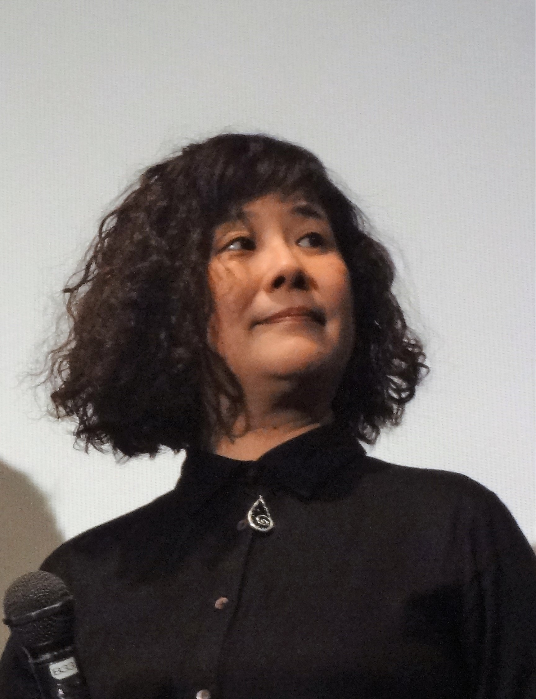 池袋シネマ・ロサにて映画「ミドリムシの夢」の初日舞台挨拶に登壇する主婦のバイト仲間・春日部役の歌川椎子